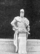 Lippold von Bredow Bildausschnitt